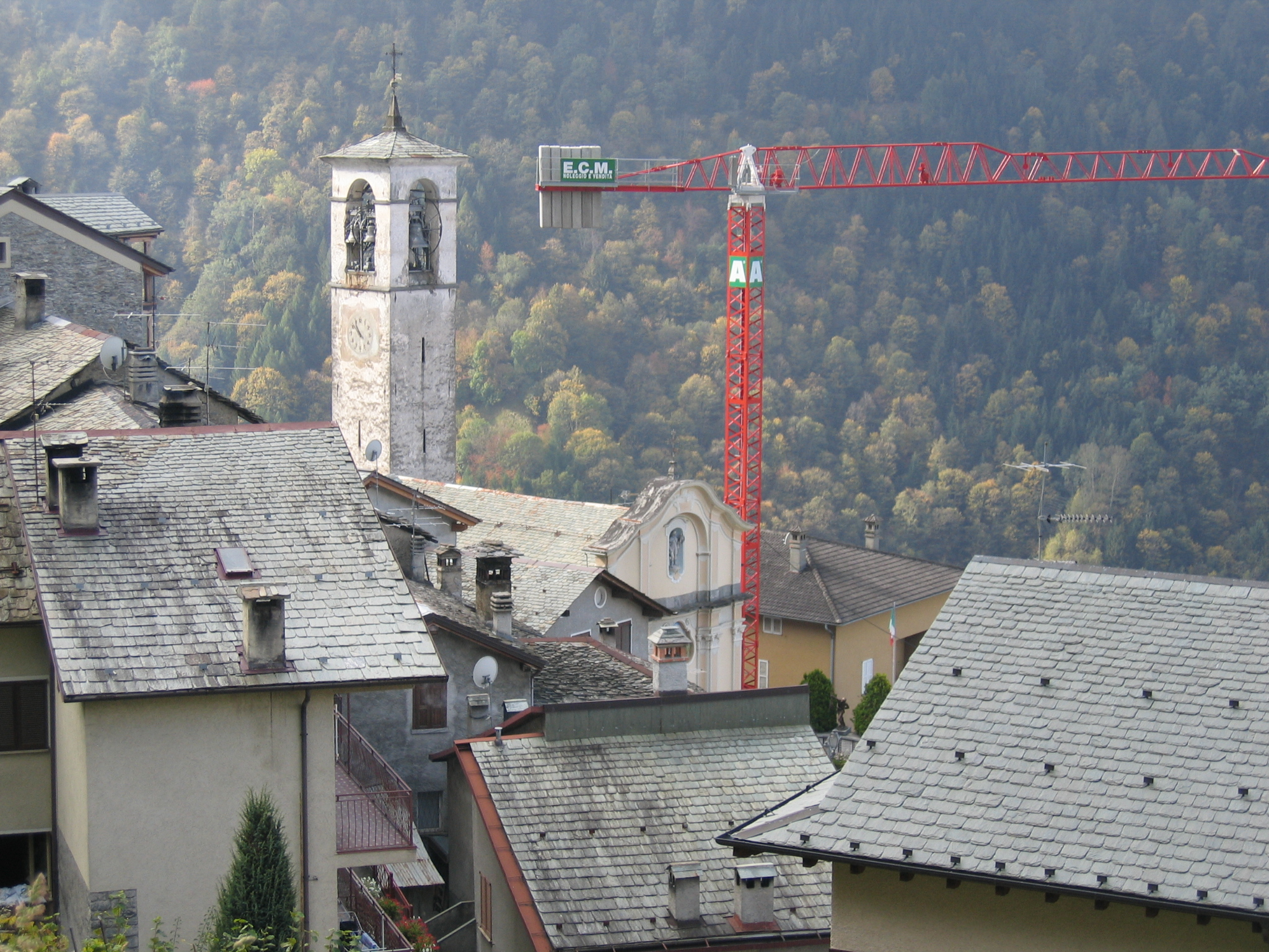 Albaredo per San Marco view